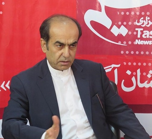 هدایت‌الله خادمی درحال مصاحبه با خبرگزاری تسنیم